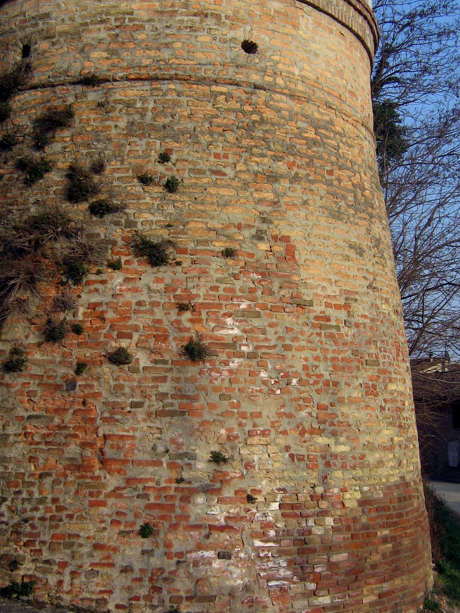 La torre degli Ansaldi, Fontanile